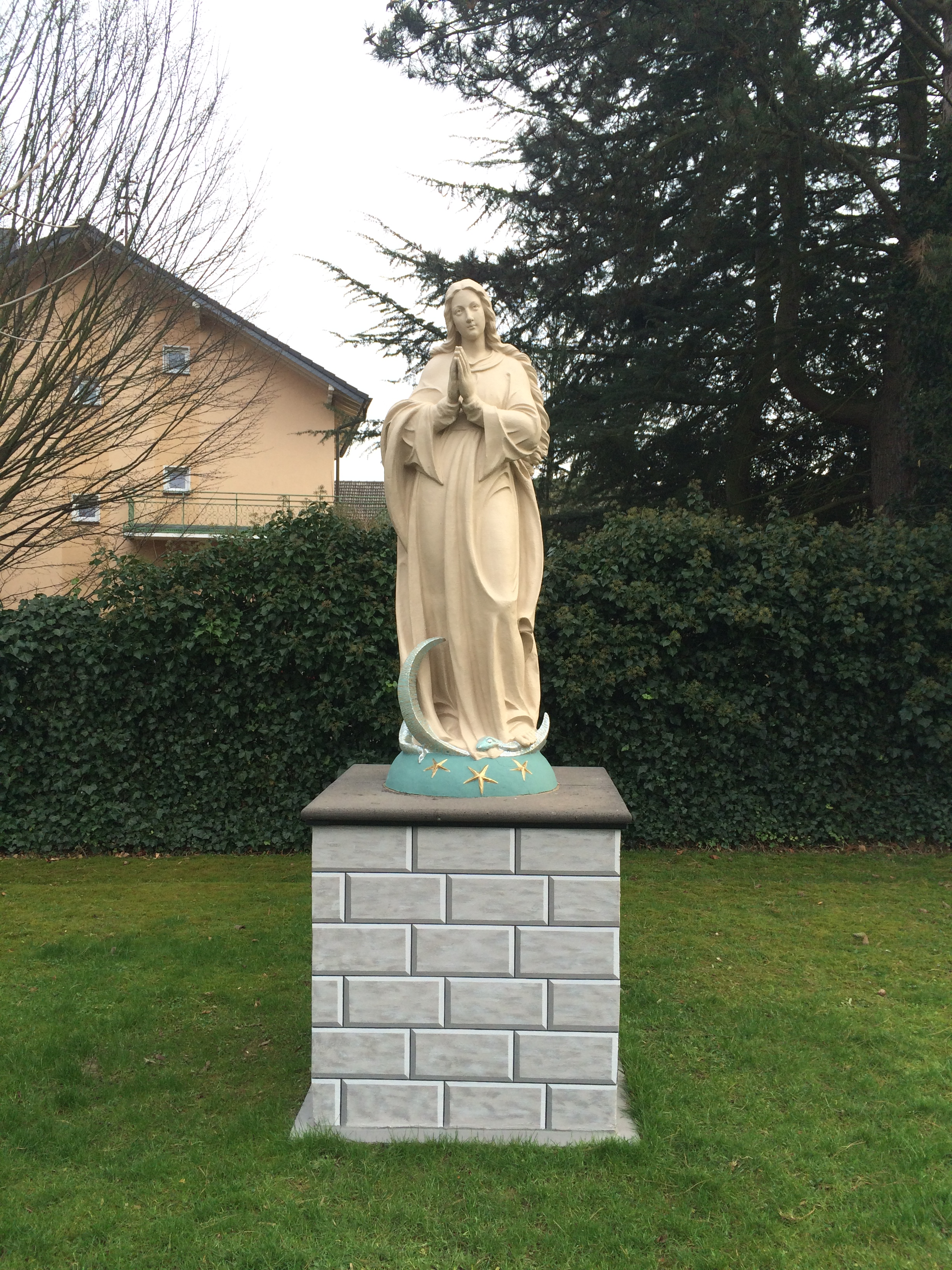 Pfarrkirche St. Mariä Heimsuchung in Sankt Augustin-Mülldorf, eine von acht Kirchen des katholischen Seelsorgebereichs Sankt Augustin.